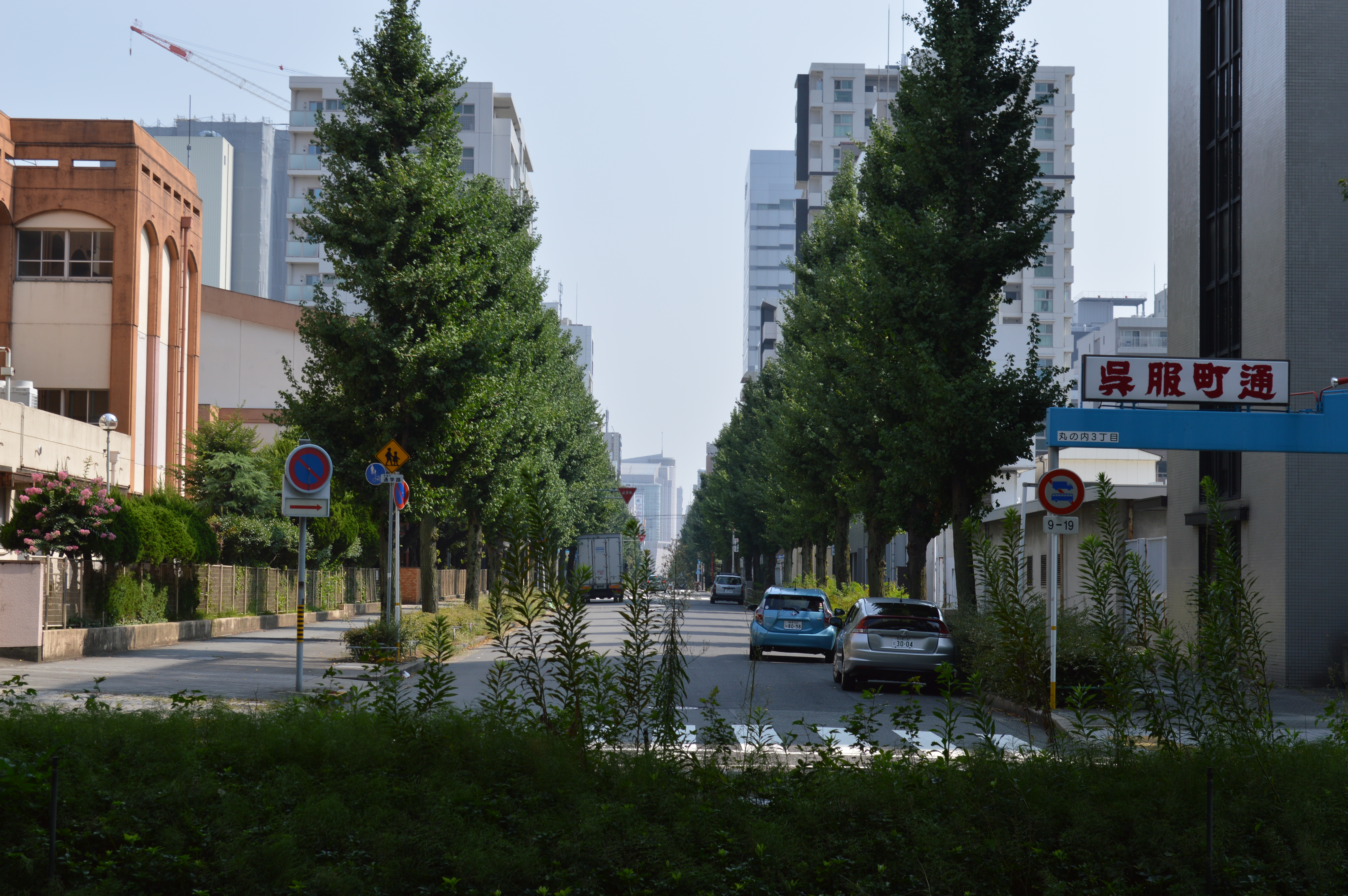 愛知県名古屋市中区の呉服町通の北側起点、外堀通から撮影